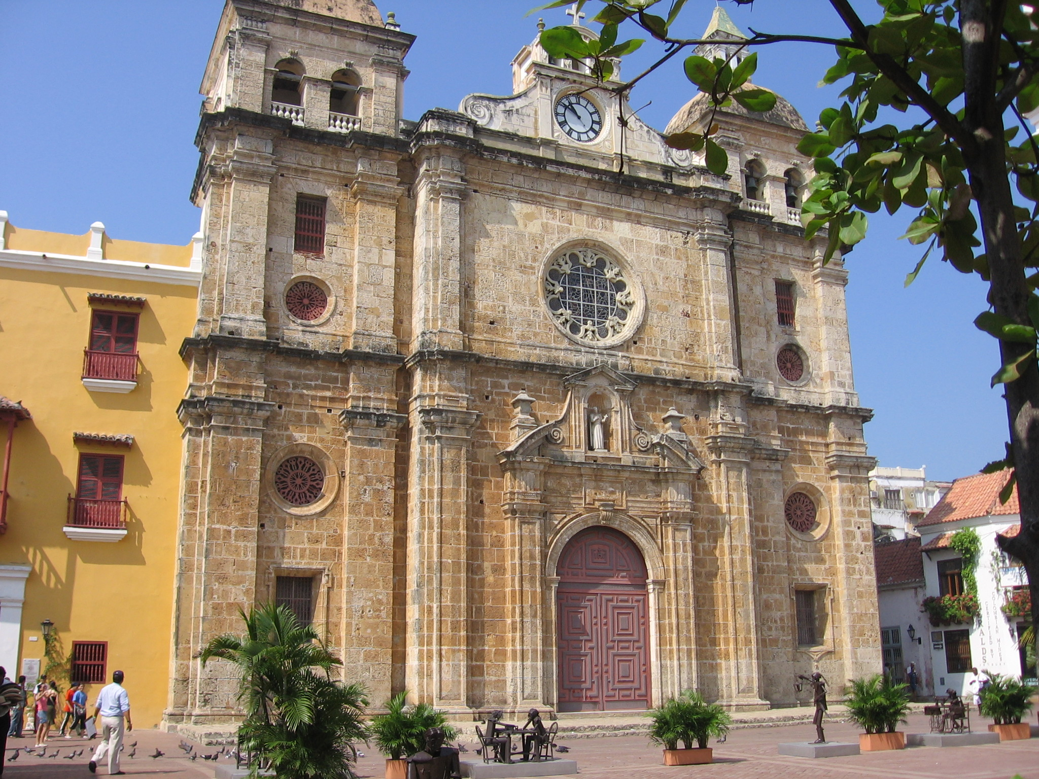 Iglesia y Claustro de San Pedro Claver